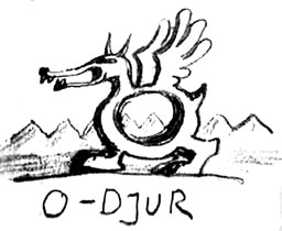 Odjur. PD